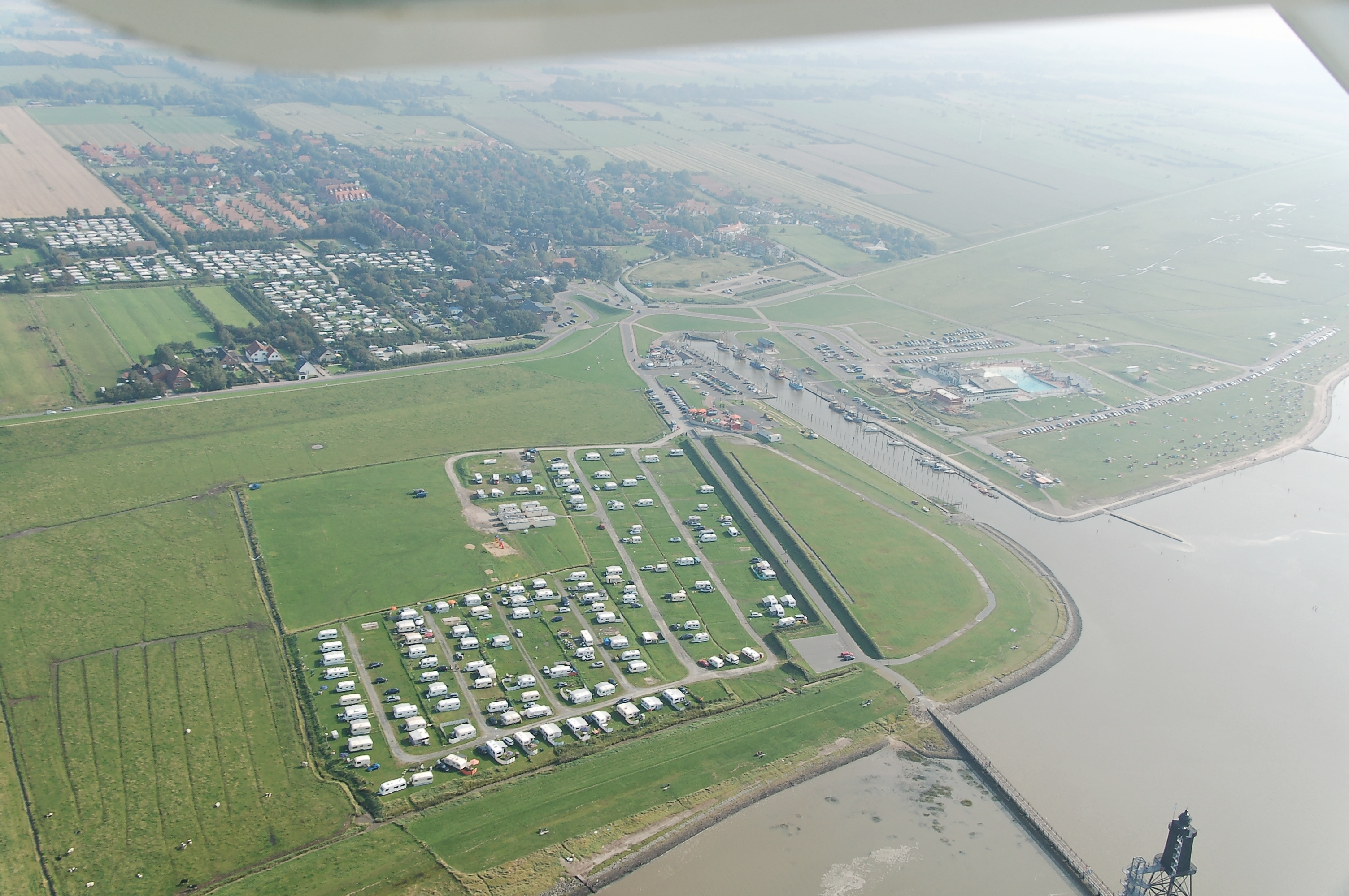 Impressionen Fotoflüge September 2011 (CPB), Dorum-Neufeld, am unteren Bildrand der Leuchtturm Obereversand Dieses Foto entstand aufgrund eines Projektes, das von Wikimedia Deutschland e. V. gefördert wurde. Im Rahmen des „Community-Projektbudgets“ sollen Luftbilder u.a. von Inseln, Halligen, Sanden und Küstenorten der deutschen Nordseeküste angefertigt werden. Das Projekt „Fotoflüge“ wurde im September 2011 begonnen.